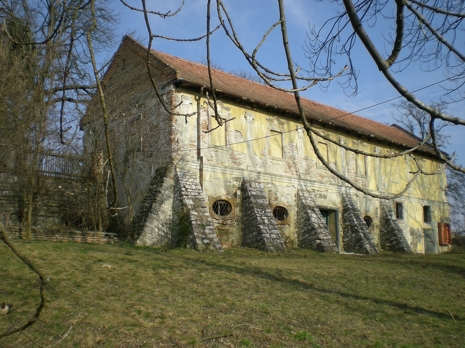 v. Prónay-kastély (Acsa, Petőfi u.) This is a photo of a monument in Hungary, Identifier: 6879